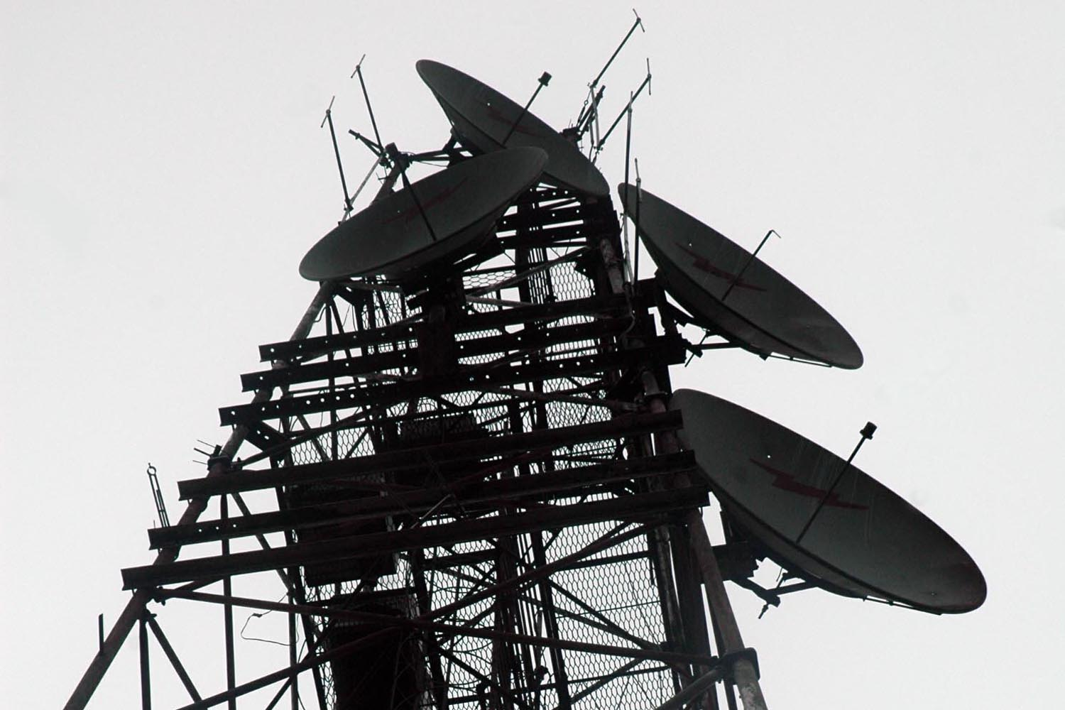 antena de rádio